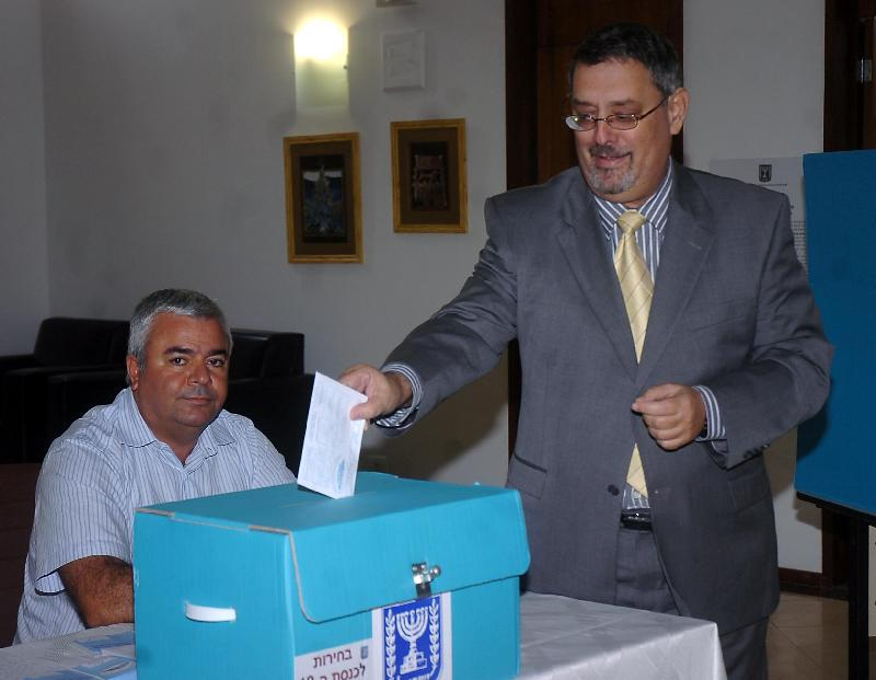 Brasília - O embaixador de Israel, Giora Becher, vota na embaixada, em Brasilia, nas eleições de 2009 daquele país. O ato acontece em 90 embaixadas e consulados israelenses no mundo Foto: José Cruz/ABr